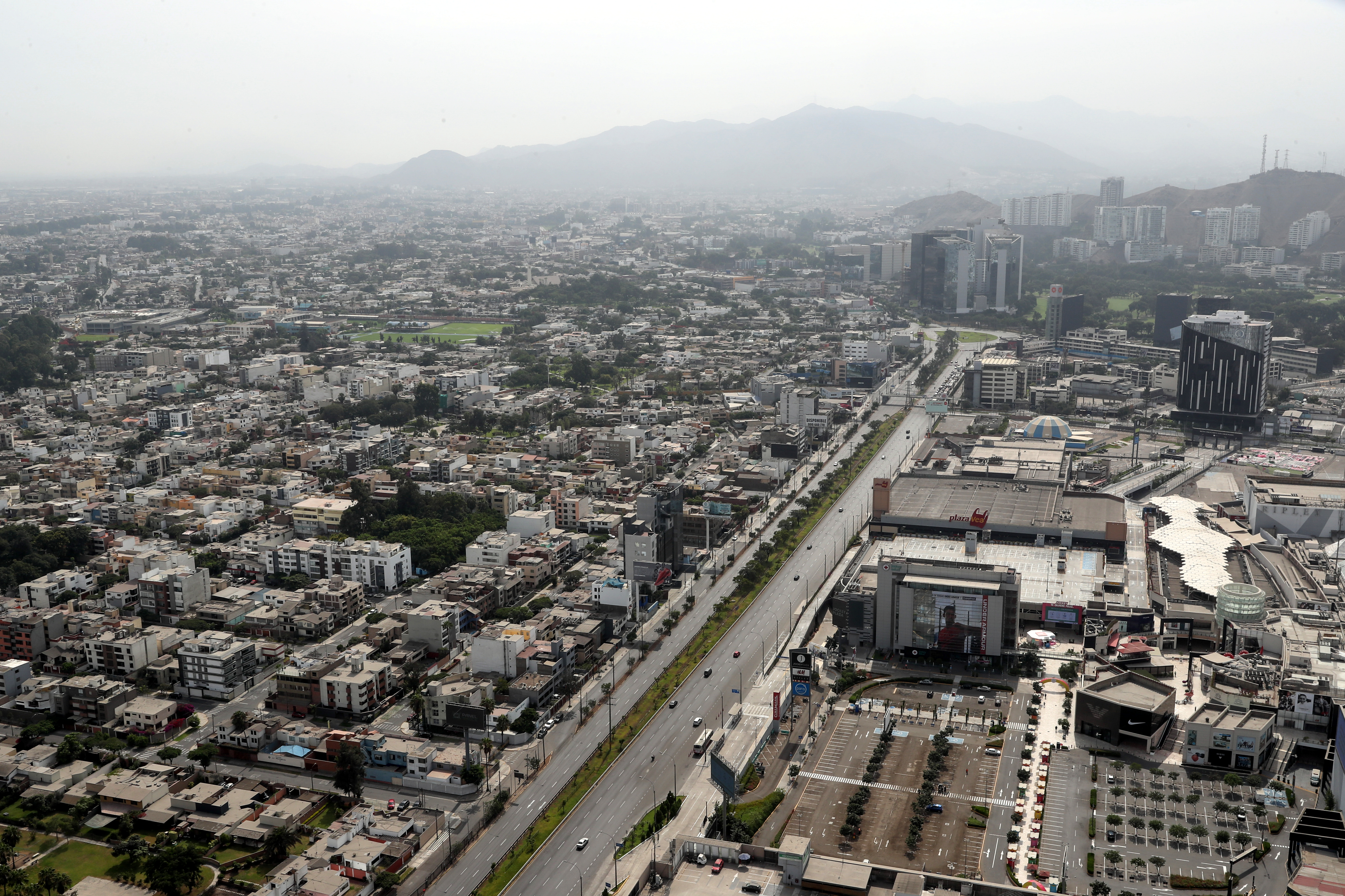 MINISTRO DE DEFENSA SOBREVOLÓ LIMA PARA VERIFICAR CUMPLIMIENTO DE ESTADO DE EMERGENCIA